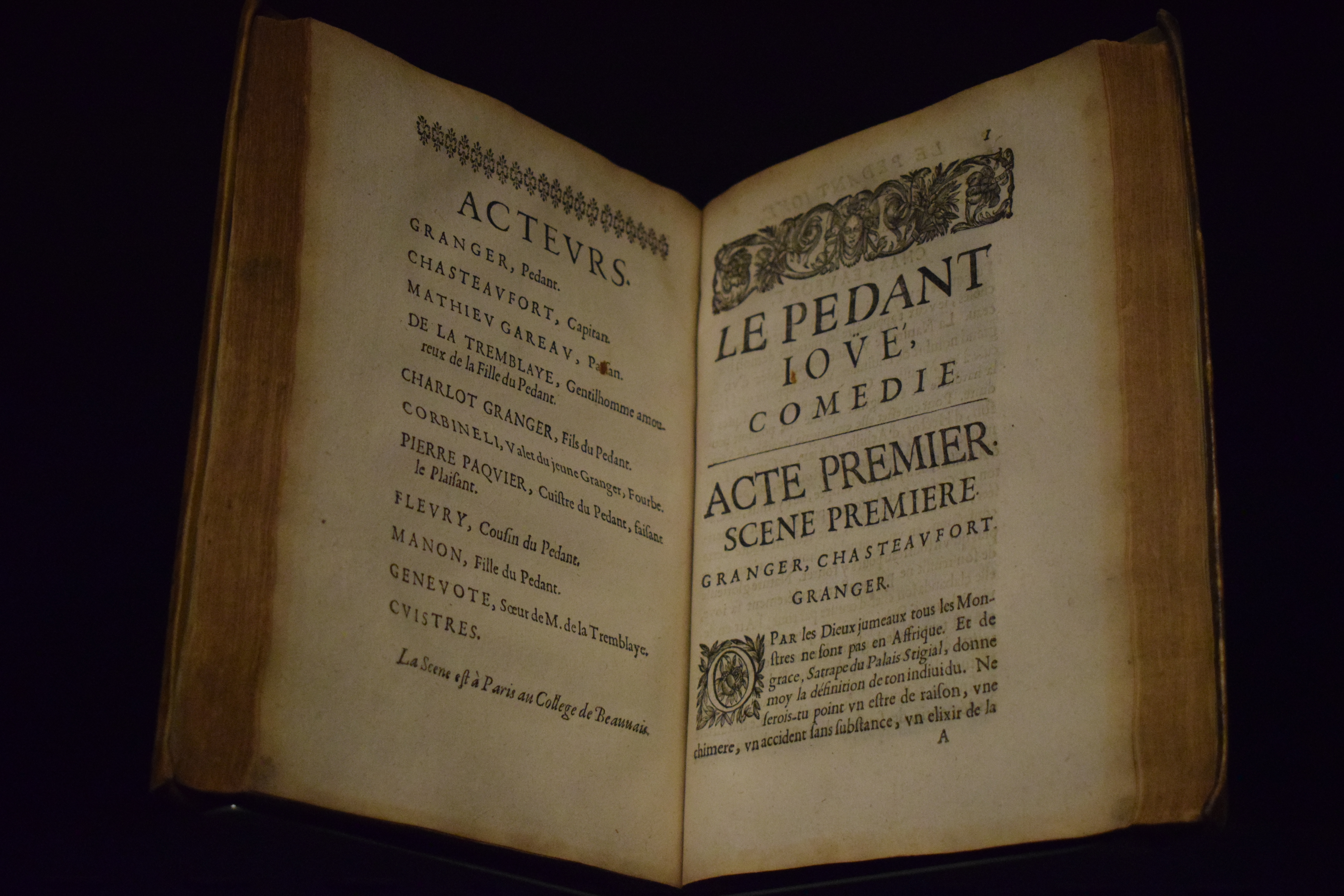 Savinien de Cyrano (1619-1655) « Le Pédant joué » Dans « Œuvres diverses de Mr. de Cyrano Bergerac », 1654, édition originale Fondation Martin Bodmer (Suisse)